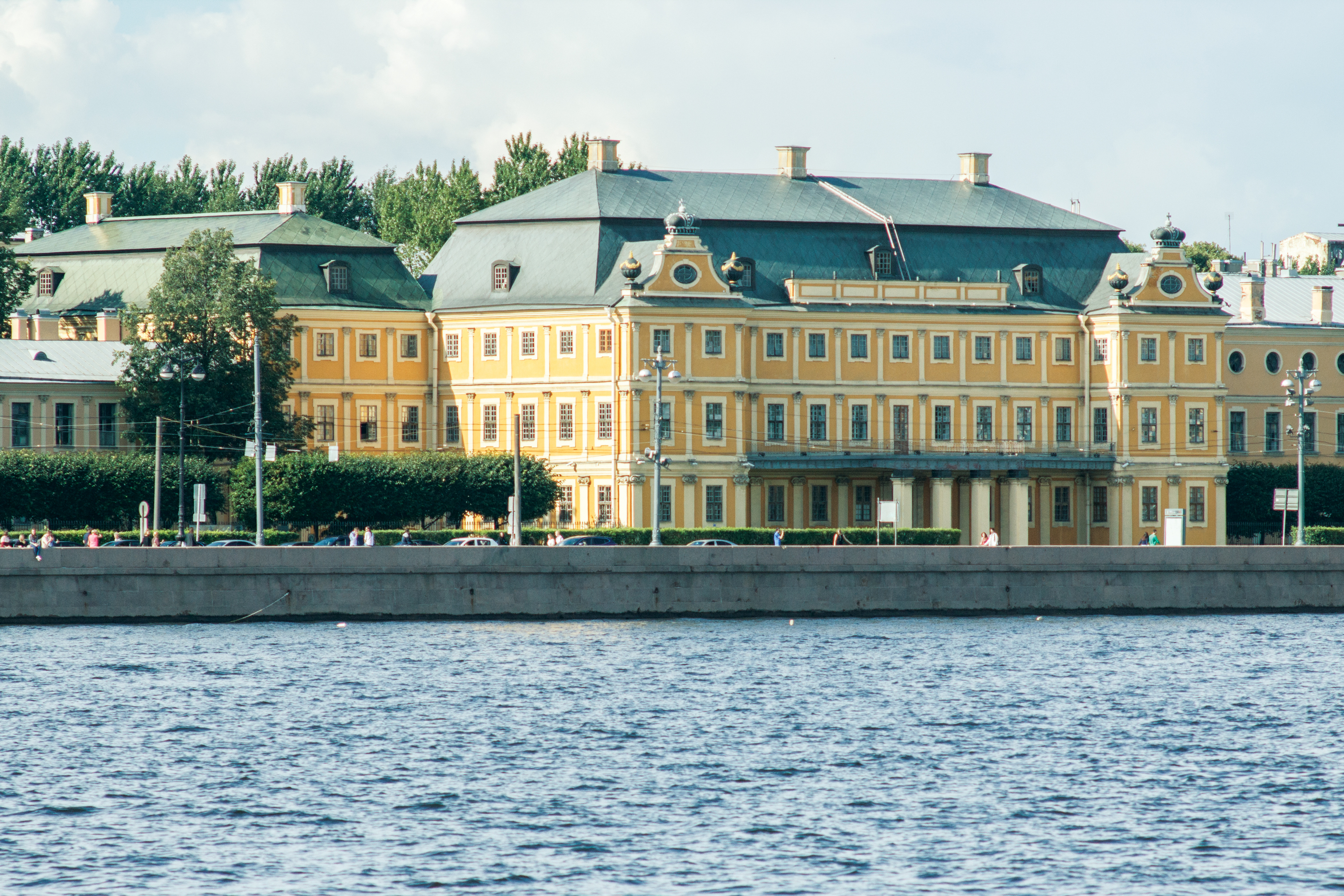 Дворец А.Д. Меншикова: Университетская набережная, 15, Василеостровский район, Санкт-Петербург